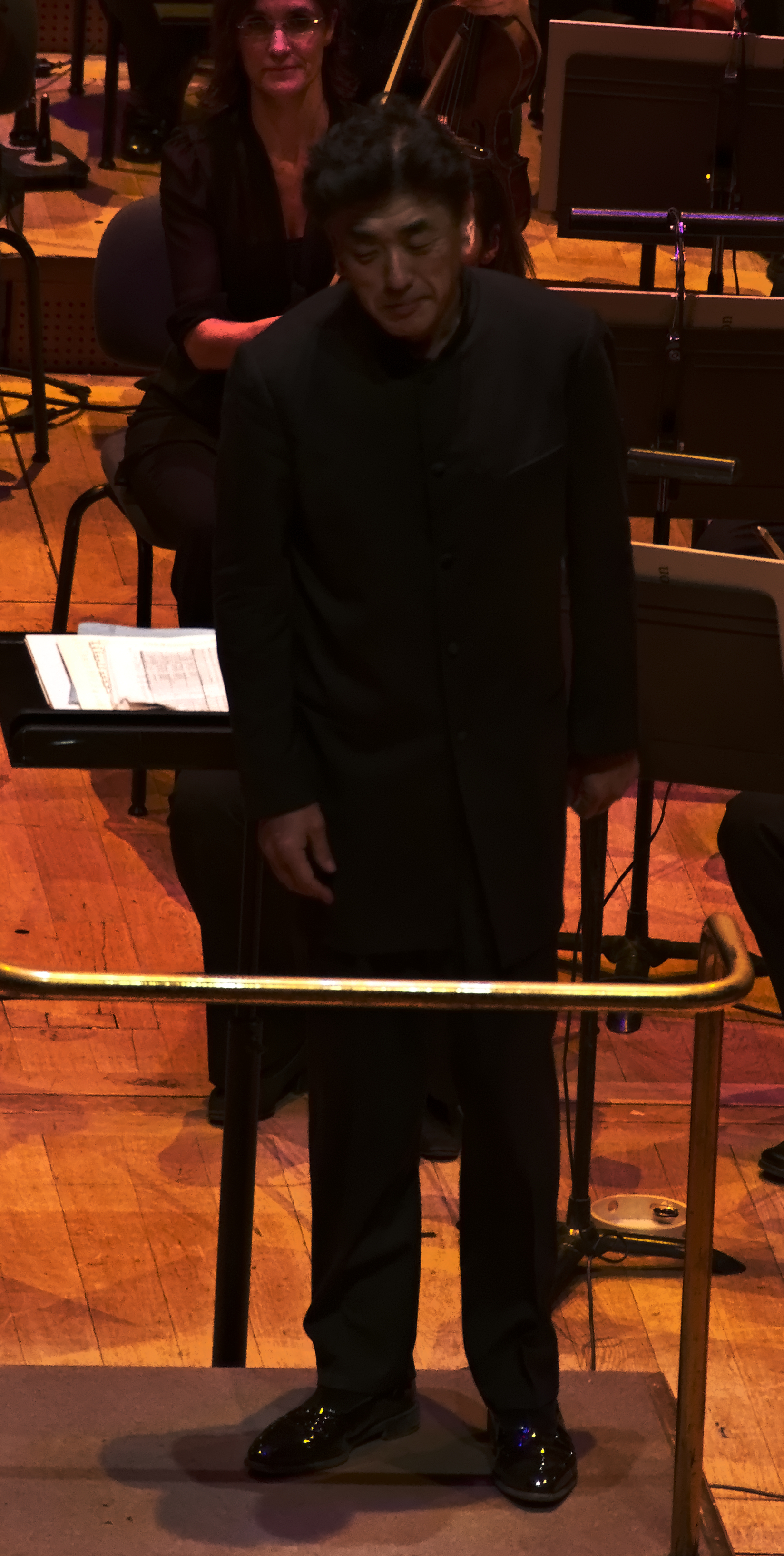 Le chef d'orchestre Yutaka Sado lors du concert de Nouvel An. Auditorium de Lyon La Part Dieu, France